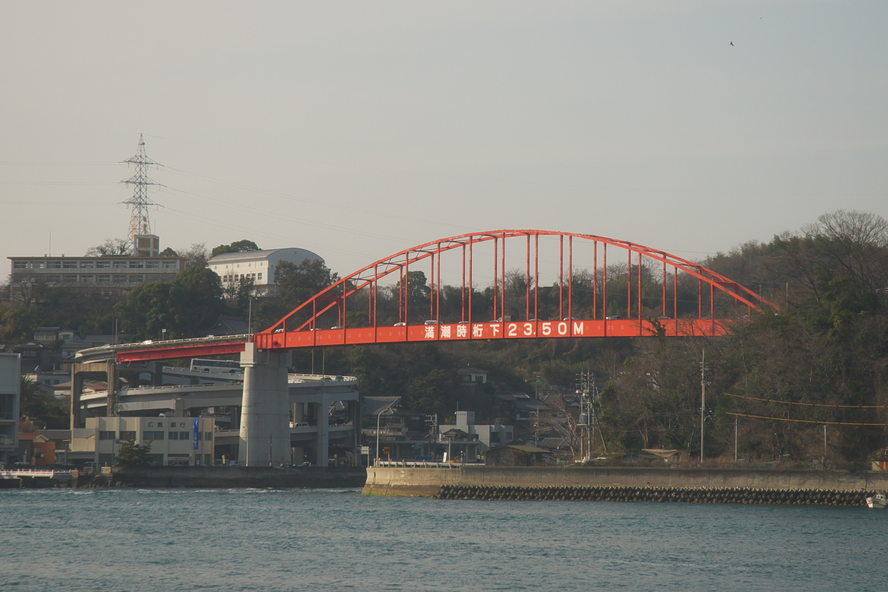 松山観光港から広島港(宇品)に向かう途中の船内から。 この橋の下を通って船は呉や広島へと向かいます。 音戸の瀬戸は本州と倉橋島の間の幅90mの海峡です。